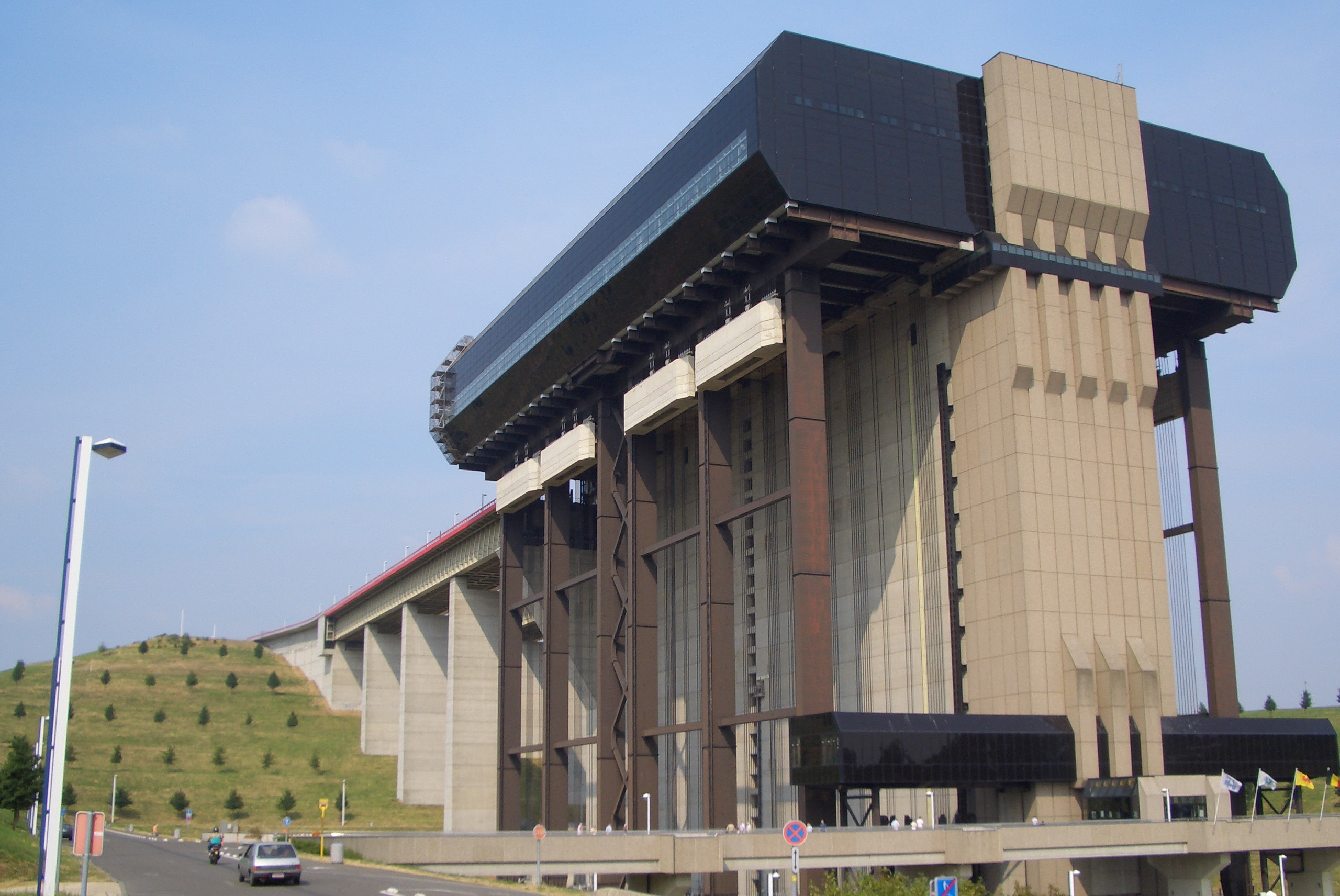 Gegengewichtshebewerk Strépy-Thieu, das zur Zeit größte Schiffshebewerk der Welt. von motorbiker selbst aufgenommen am 26.06.2005